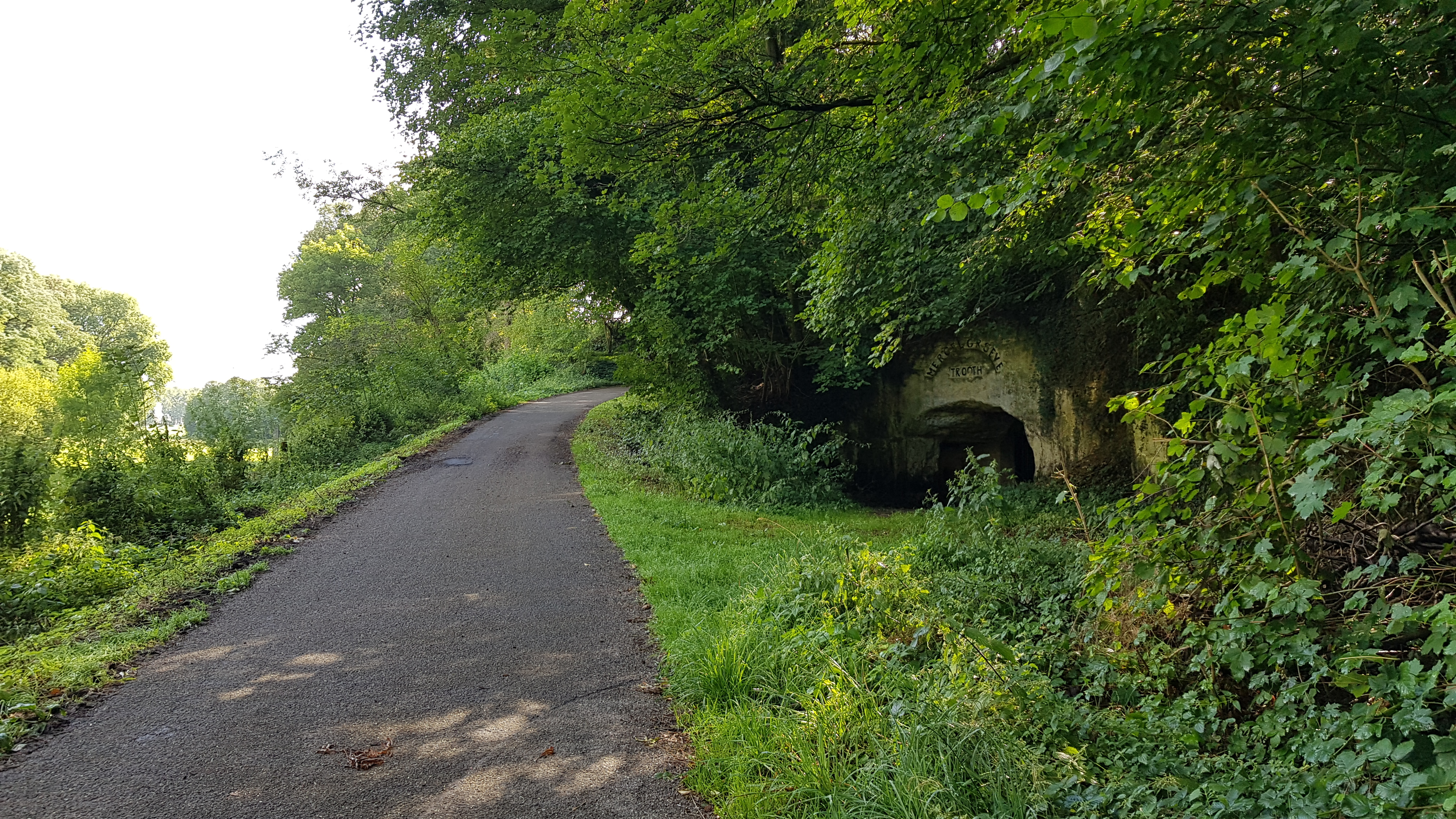 Roothergroeve, Bemelen, Nederland